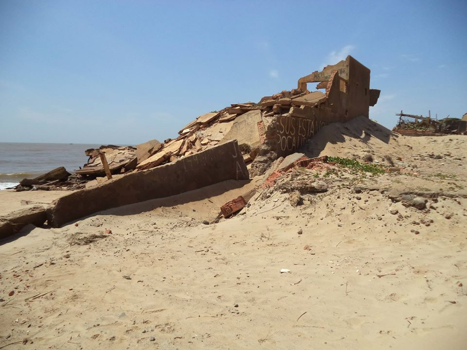 Ruínas em Atafona, São João da Barra, Brasil.